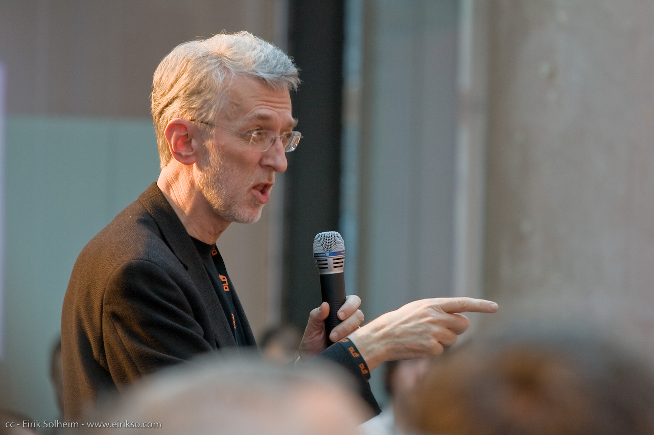 DLD08